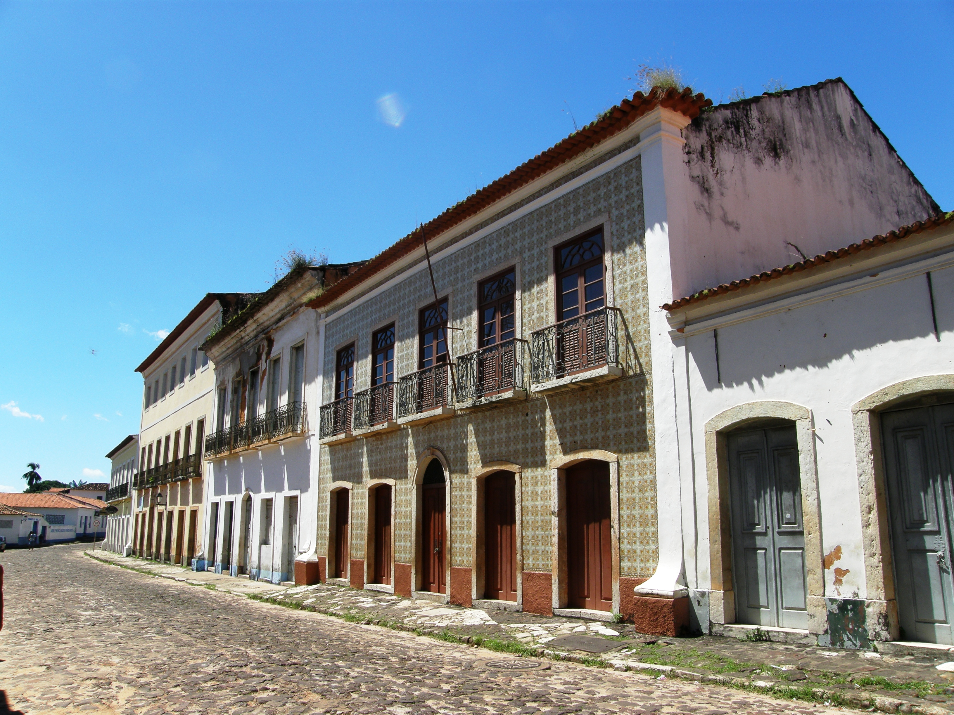 Alcântara, MA: conjunto arquitetônico e urbanístico